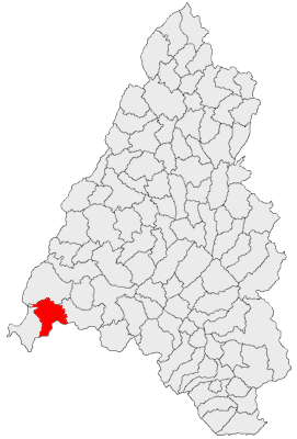 Categorie:Hărţi ale judeţului Bihor